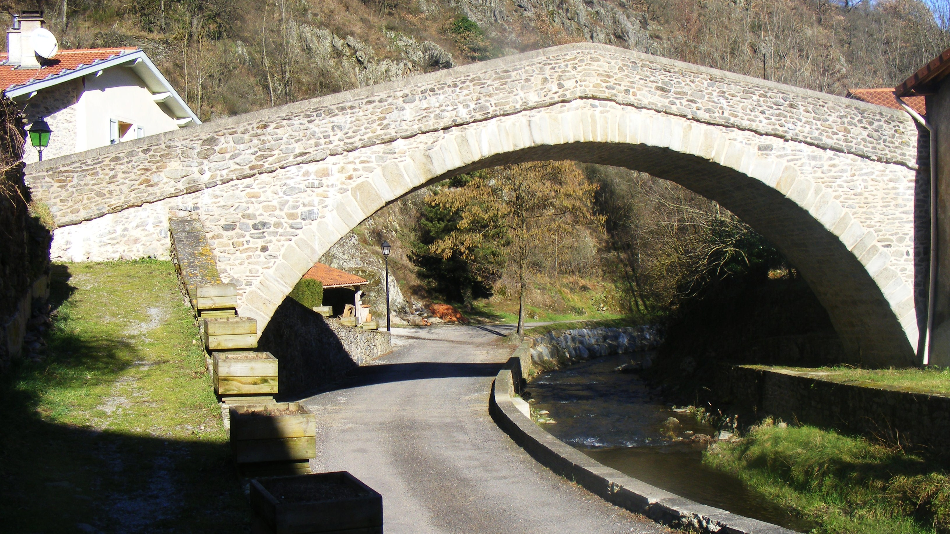 pont médiéval à Chagnon (France)